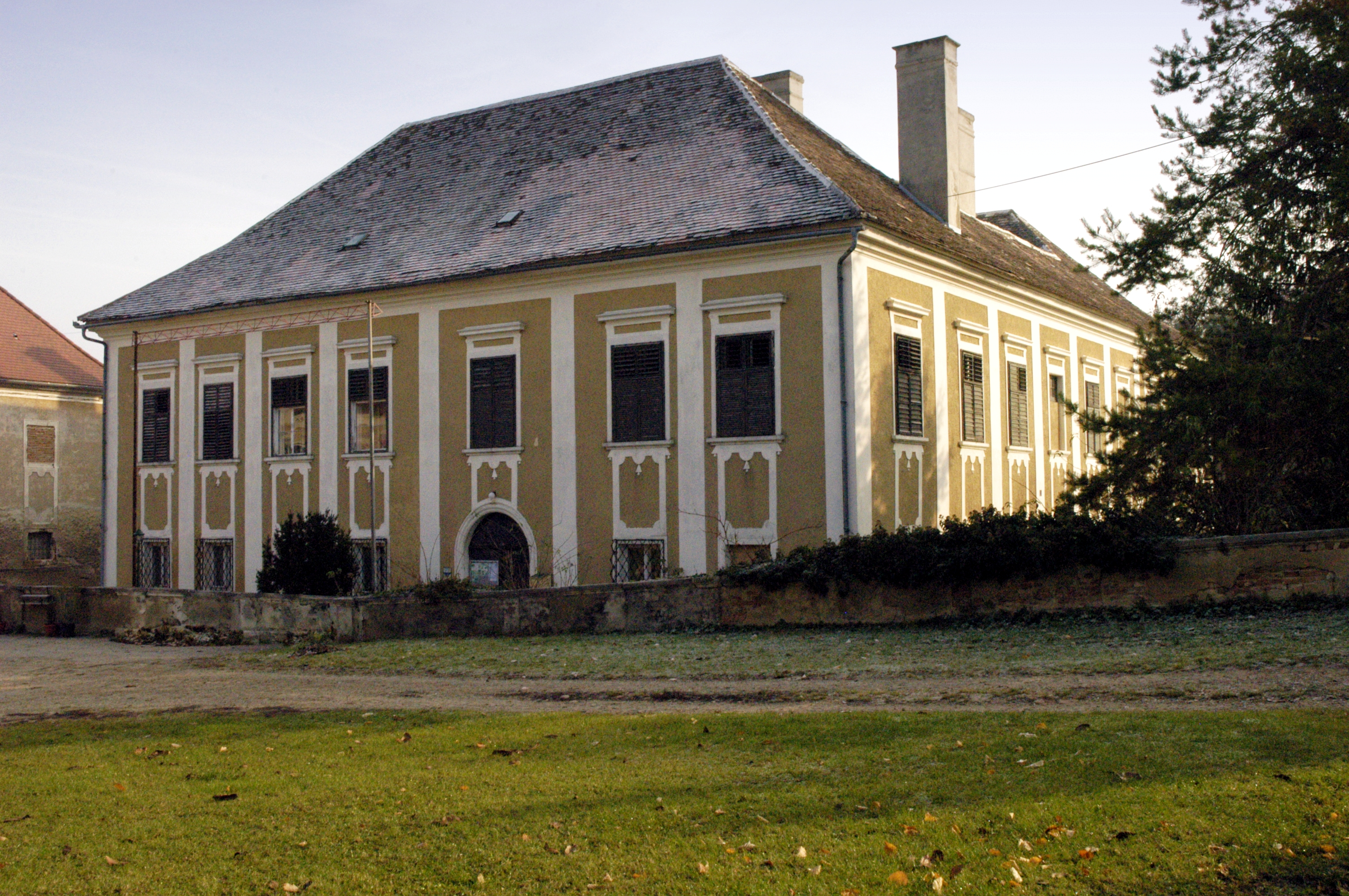 ehemaliges Wasserschloss, heute Pfarrhof in Unterdürnbach, Gemeinde Maissau